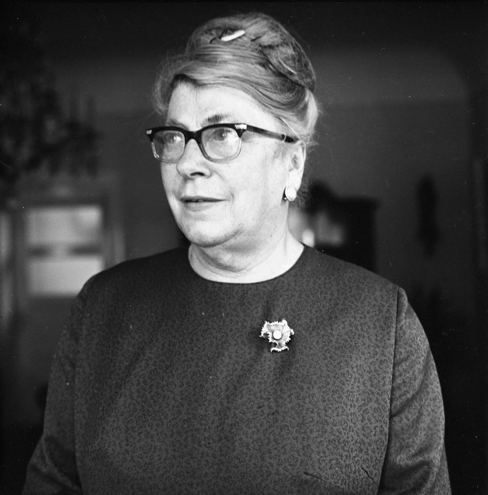 vor der Verabschiedung durch die Kieler Ortsgruppe.